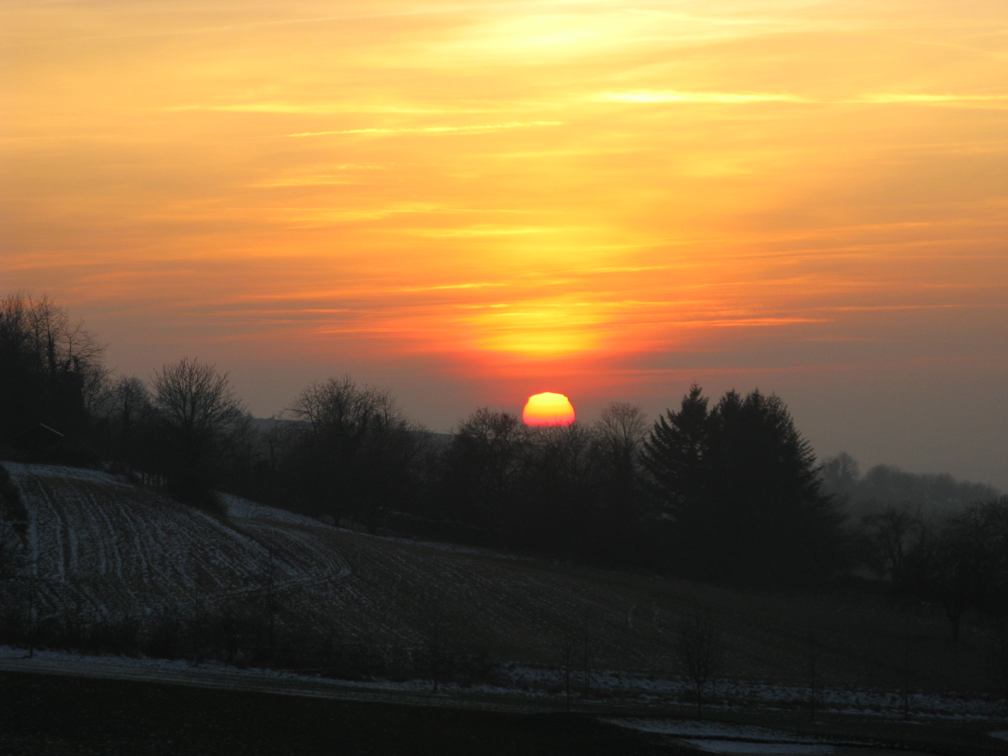 Kapellenberg (St. Mary's Chapel), Bad Bellingen-Bamlach, Germany